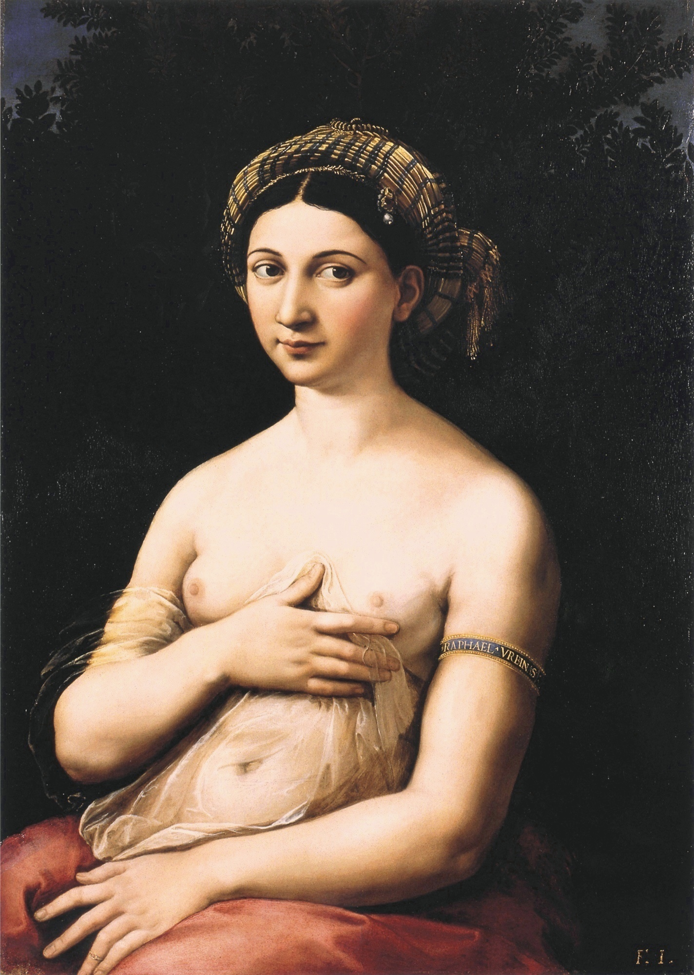 Зображено Маргариту Люті — імовірно кохану Рафаеля